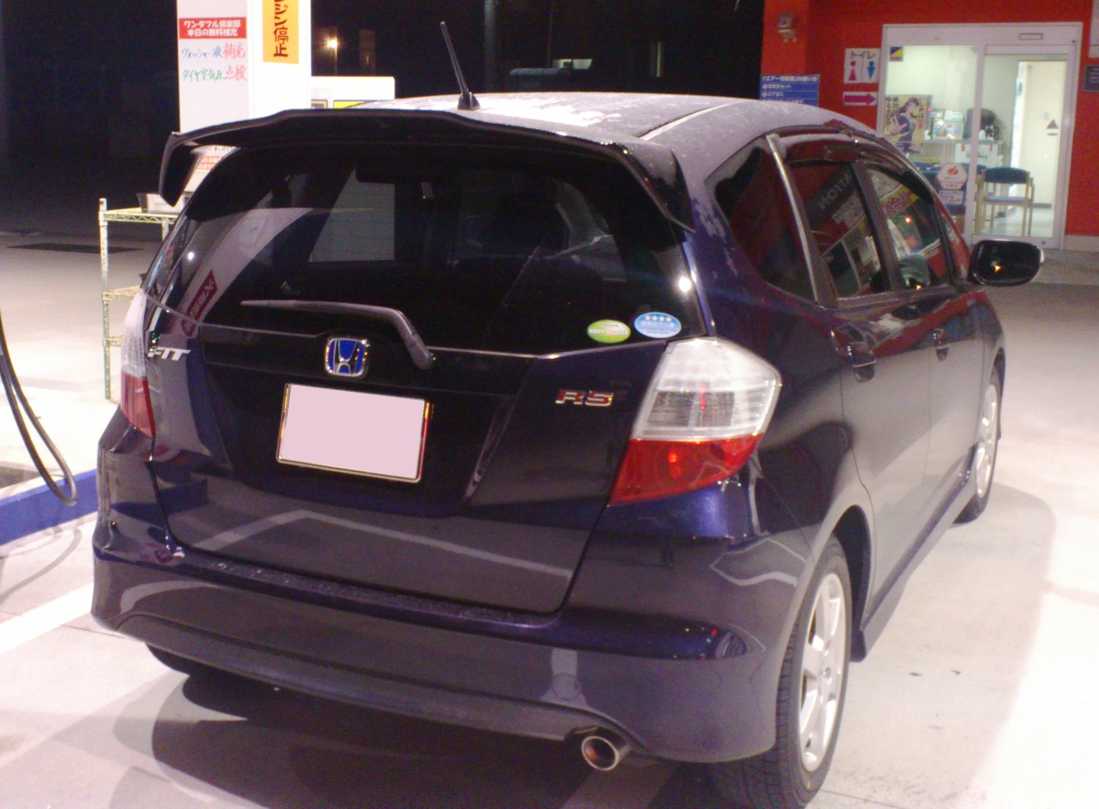 フィットRS 前期型 リア